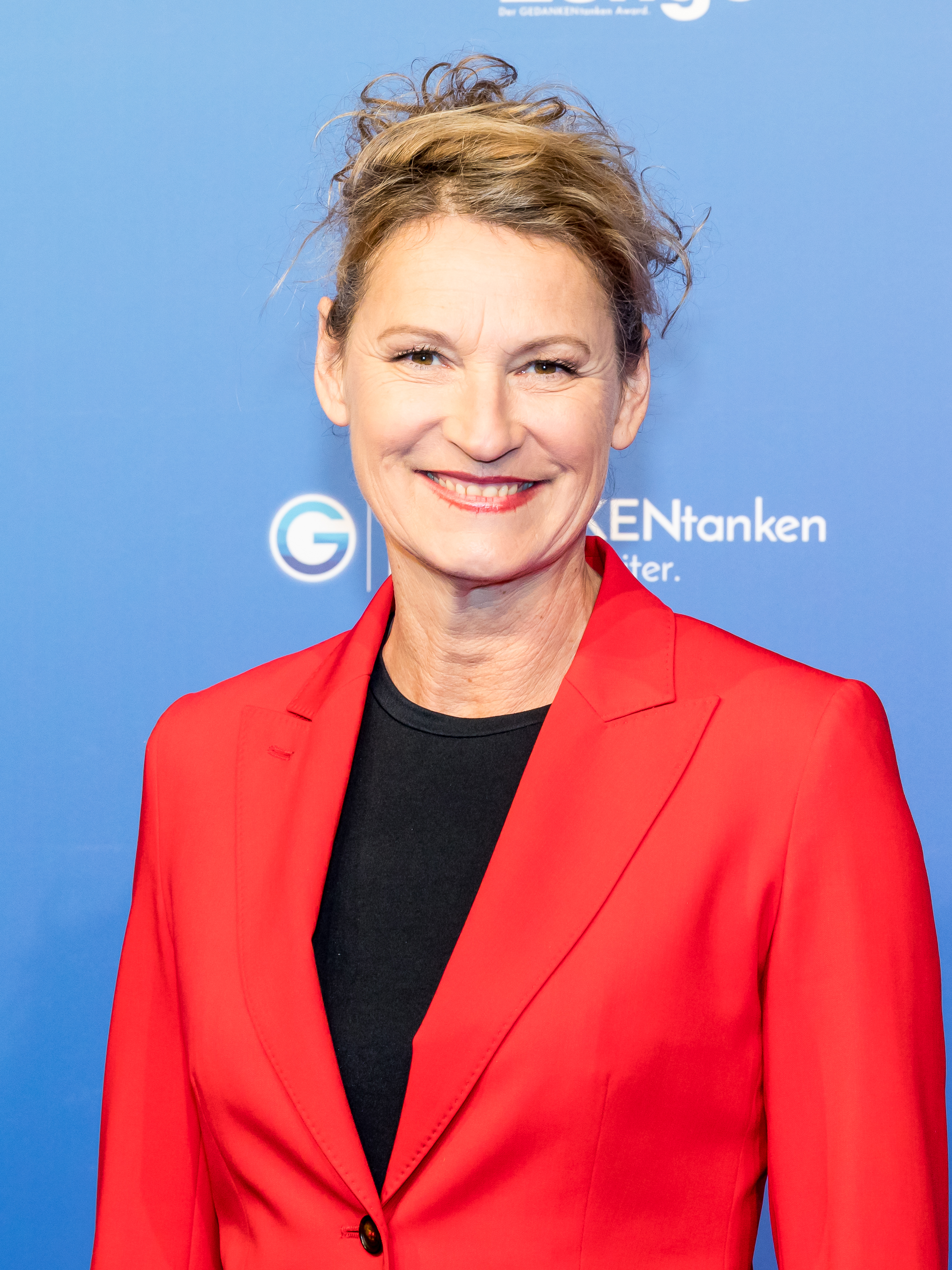 GedankenTanken Köln 2018 - 02 - Roter Teppich, der in blauer Farbe ausgeführt ist. Foto: Heike Meier-Henkel, Leichtathletin